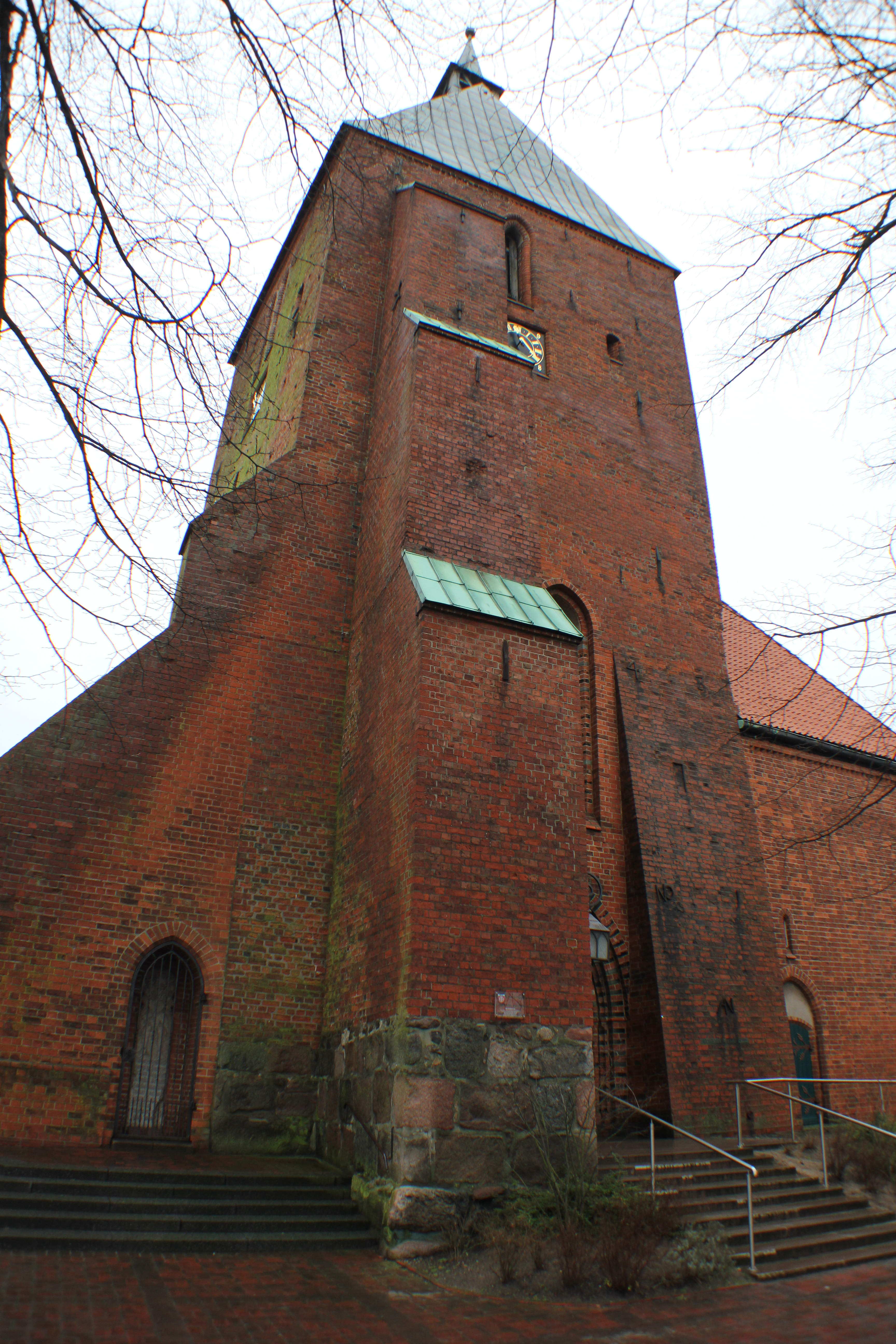 St. Nicolai und Till Eulenspiegel-Gedenkstein (Eulenspiegel-Grab) (Mölln) (auf der linken Seite der Kirche ist der Eulenspiegel-Gedenkstein)Unknown